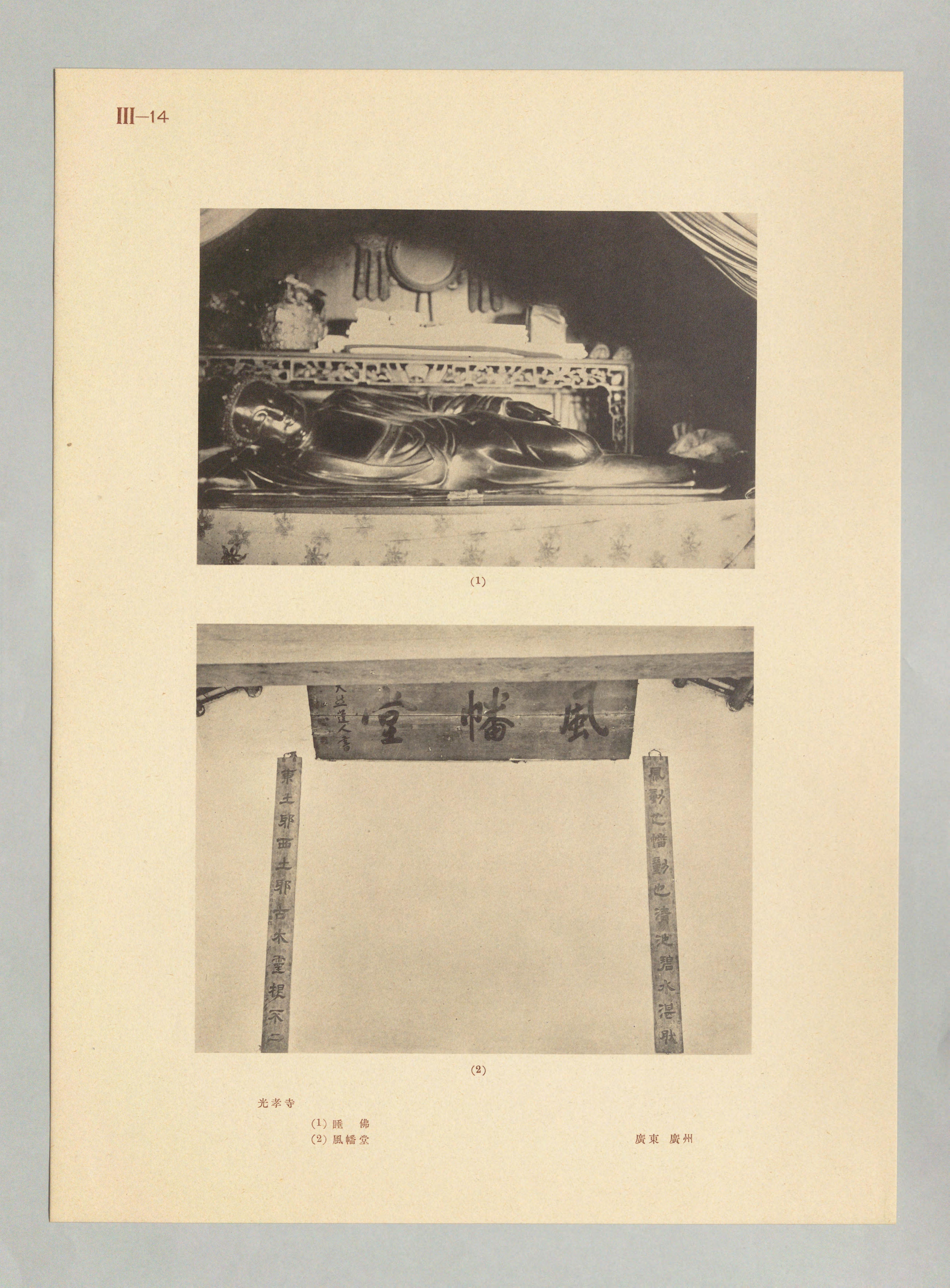 廣州市光孝寺風幡堂內的睡佛